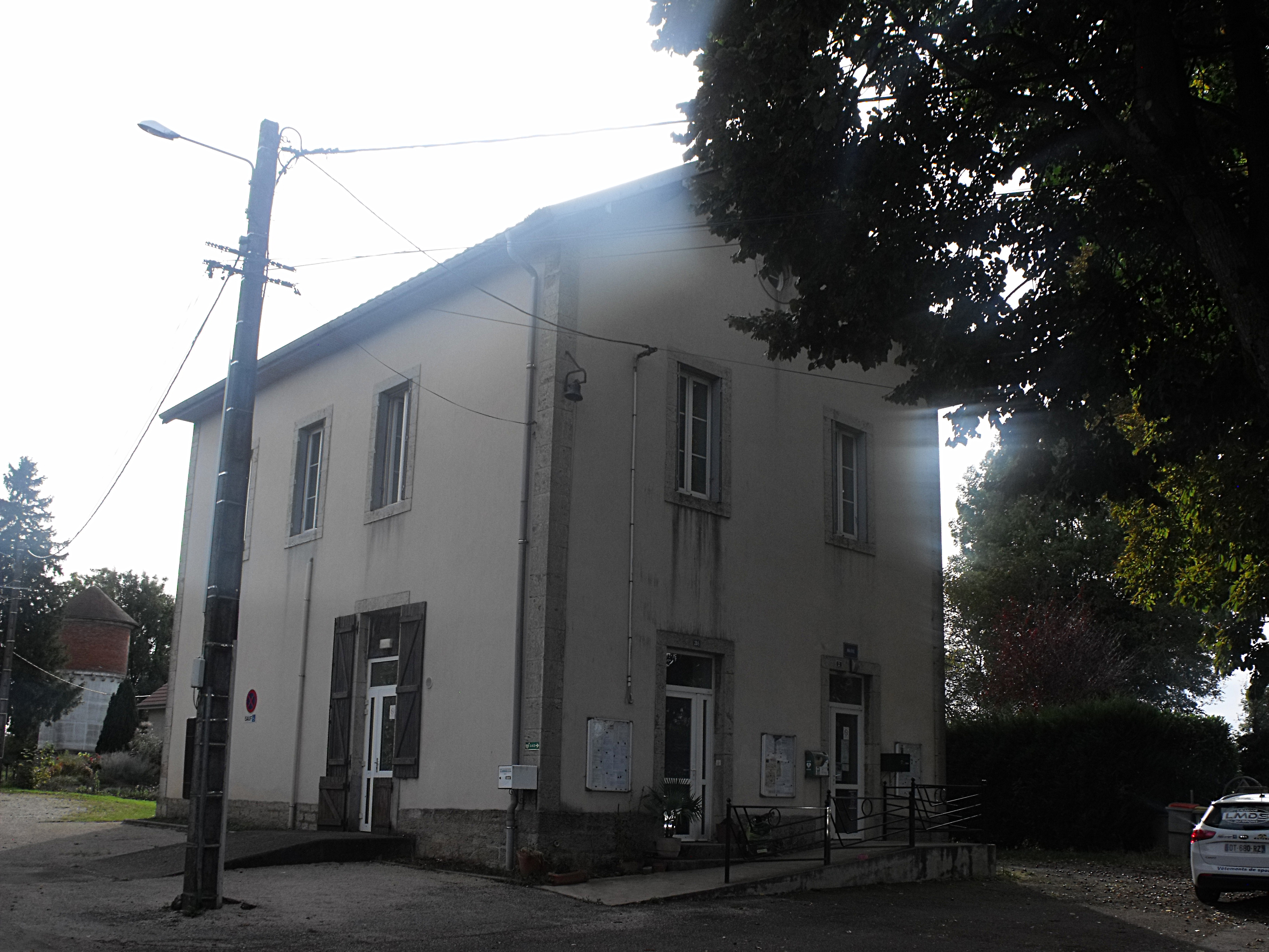 Mairie de Vergranne, Doubs, France